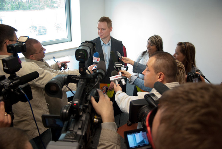 Press conference in Wloclawski Inkubator Innowacji i Przedsiebiorczości.